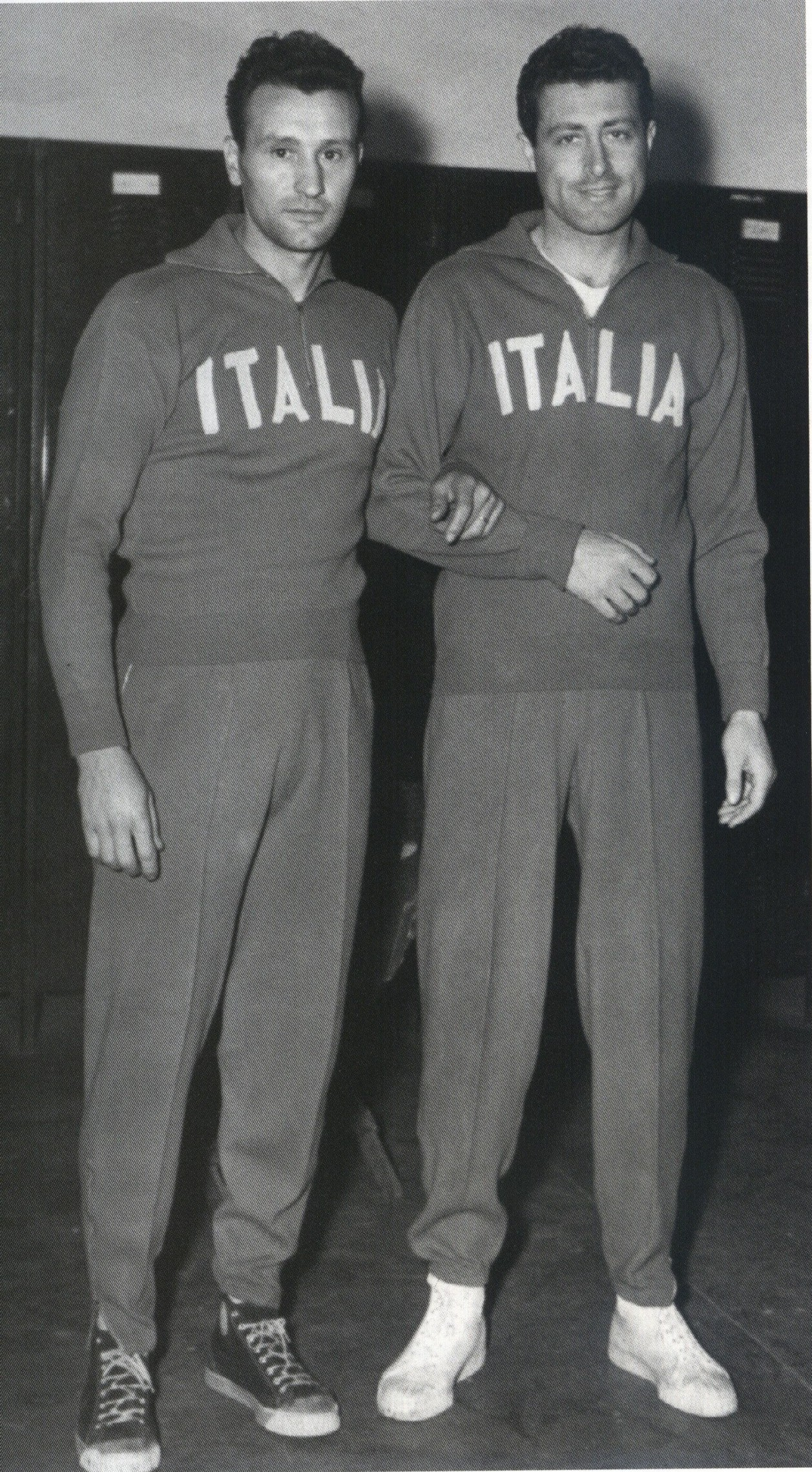 raduno Nazionale a Trieste per VII° Campionato Europeo di Parigi (3-12 maggio 1951), Gigi Marsico e Sergio Stefanini